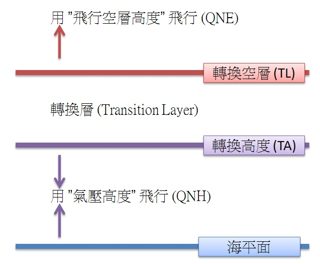 轉換高度與轉換空層